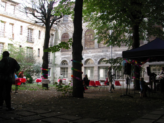 Couvent des Récollets (Paris 10e) en restructuration